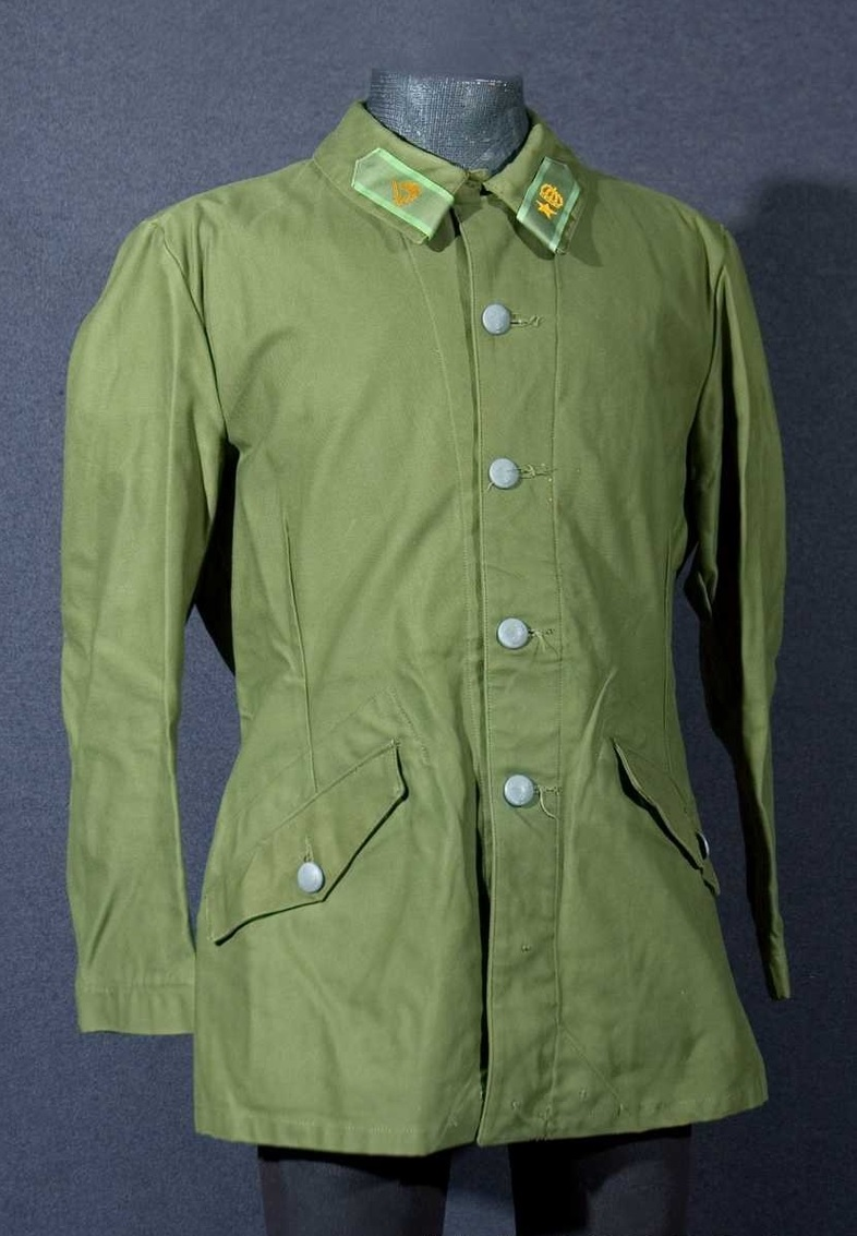 Vapenrock m/1959 Identifikationsnr: AM.093021 Samling: Armémuseum